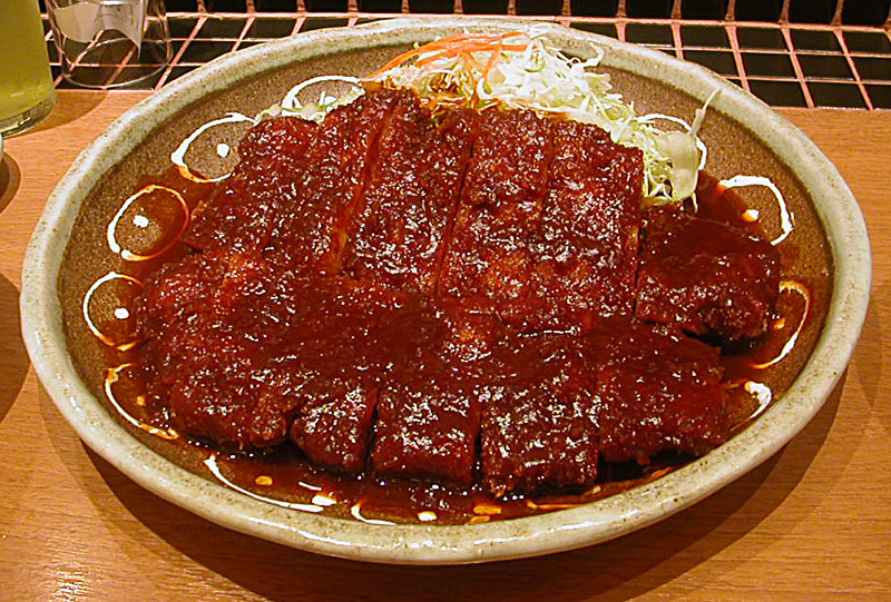 撮影者：小太刀 矢場とん の わらじとんかつです。